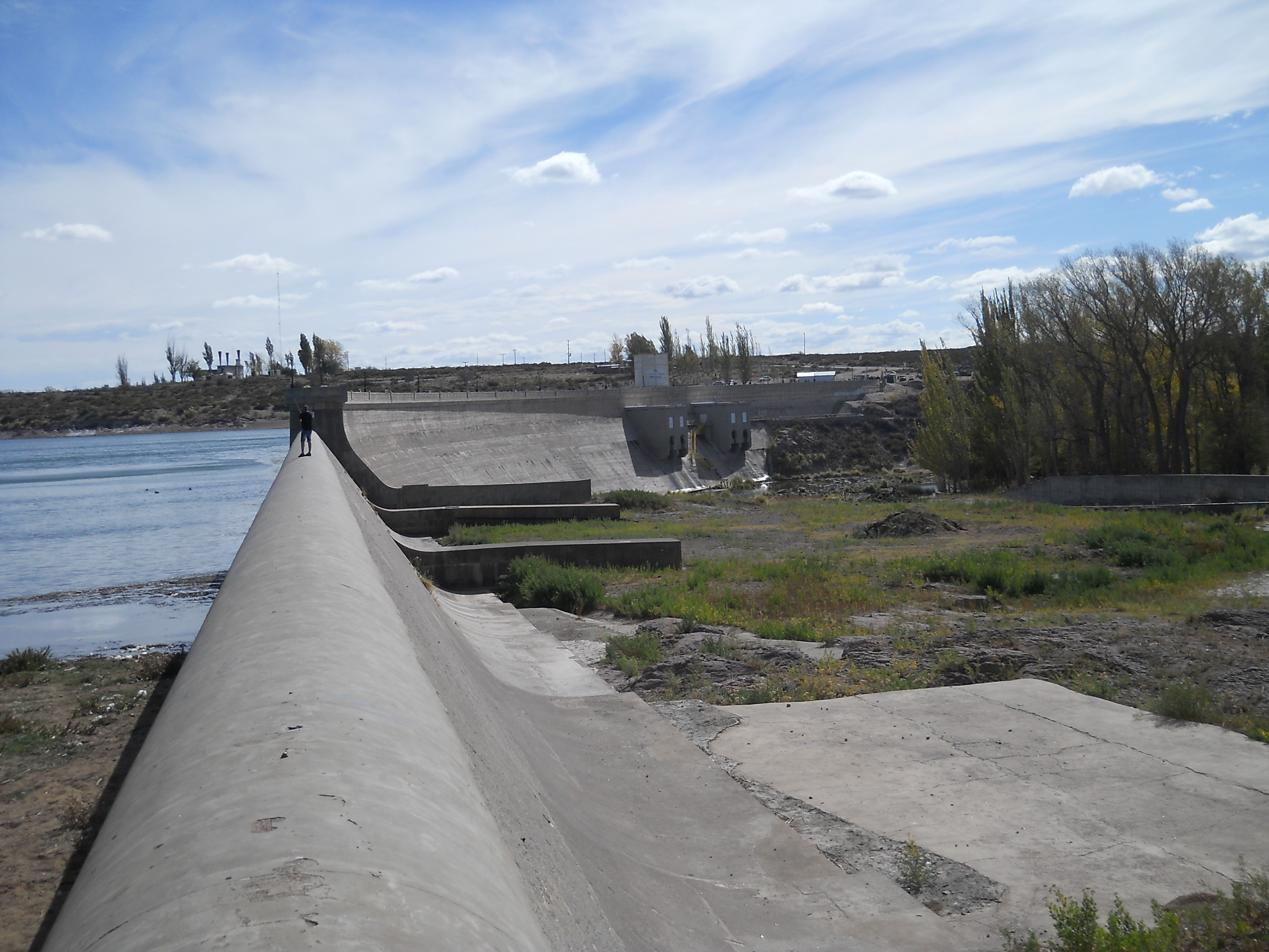 Paredón del dique